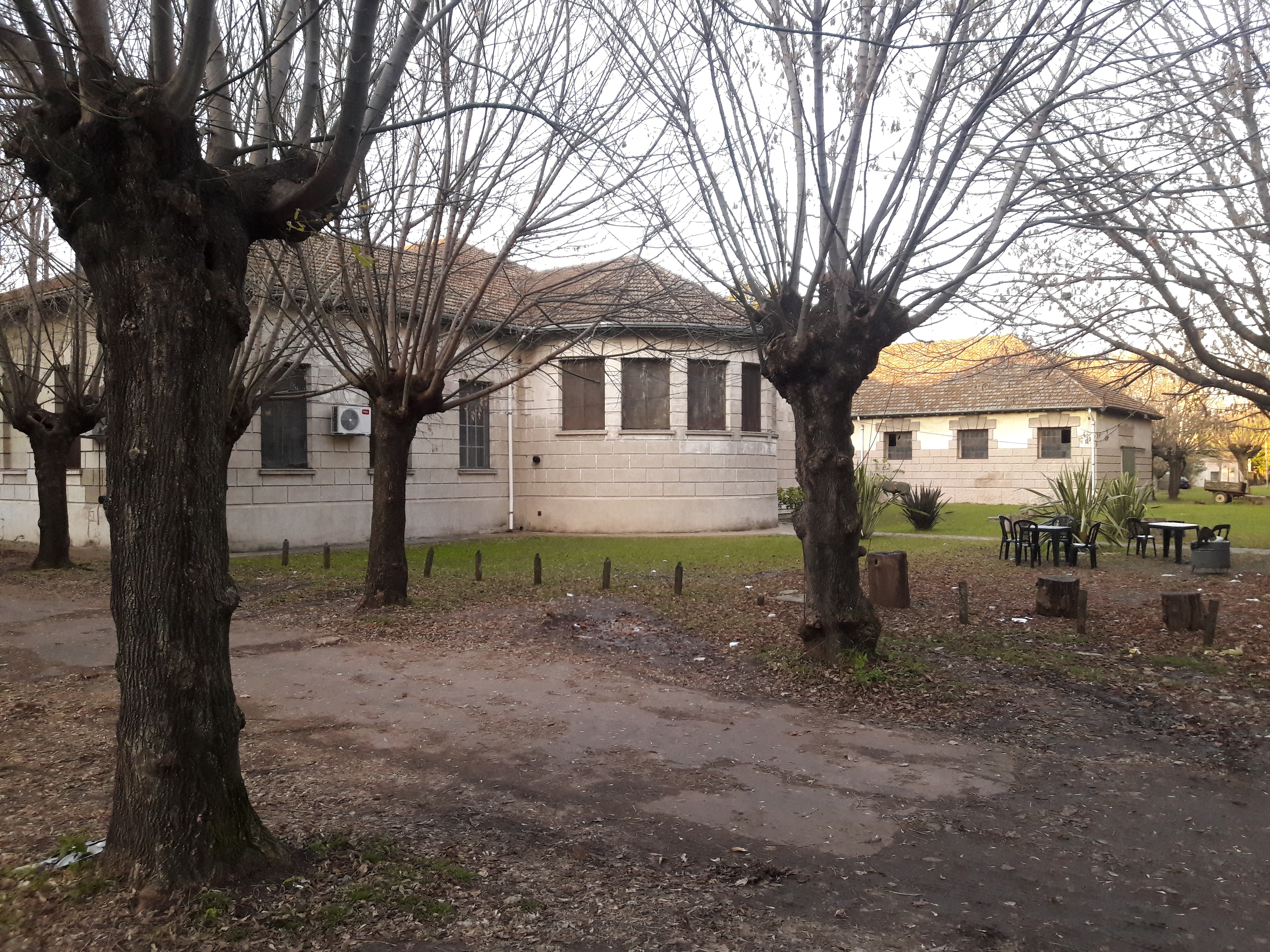 En una tarde otoñal